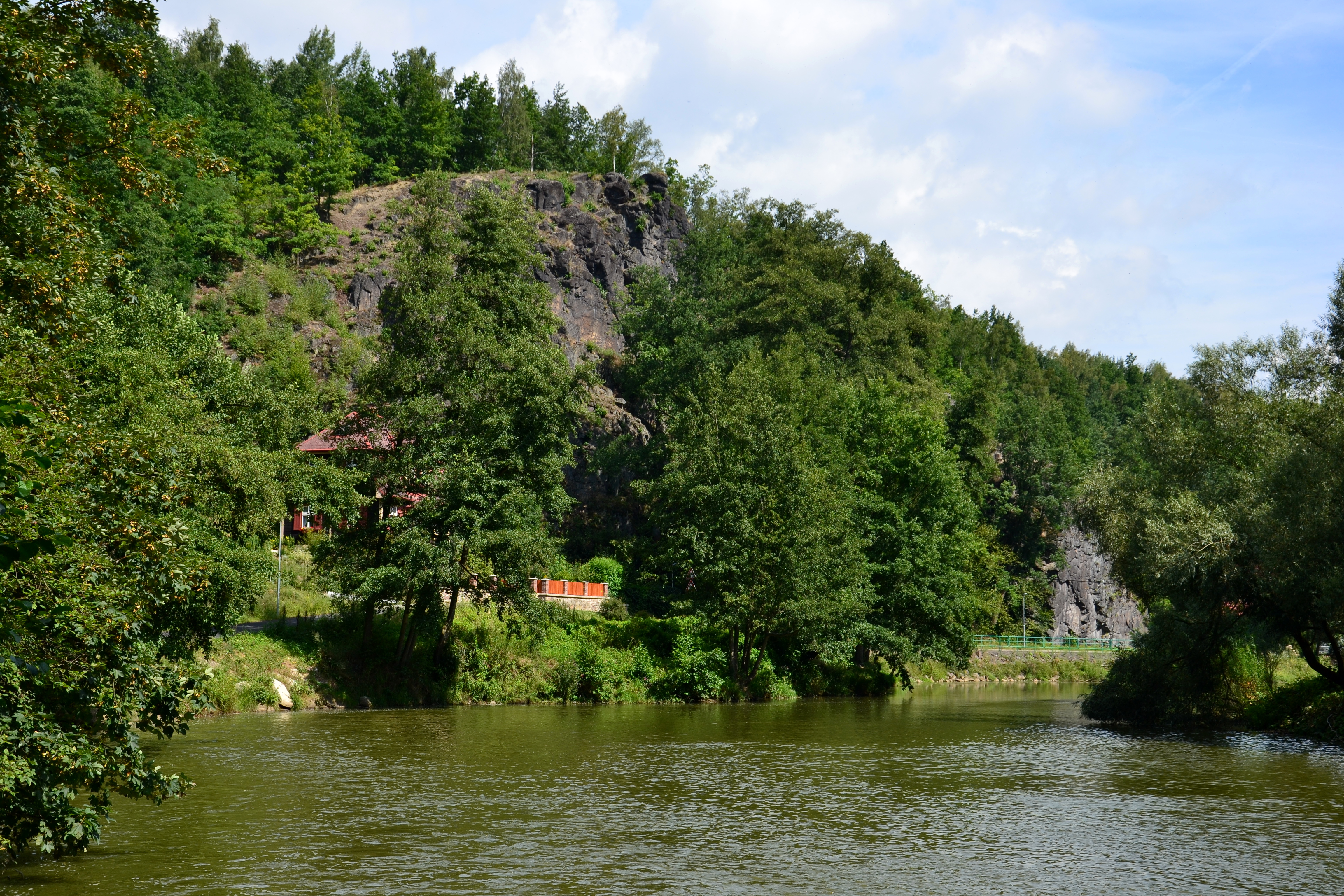 Hradiště Starý Loket, jihozápadní okraj obce, nad levým břehem Ohře, Tašovice.